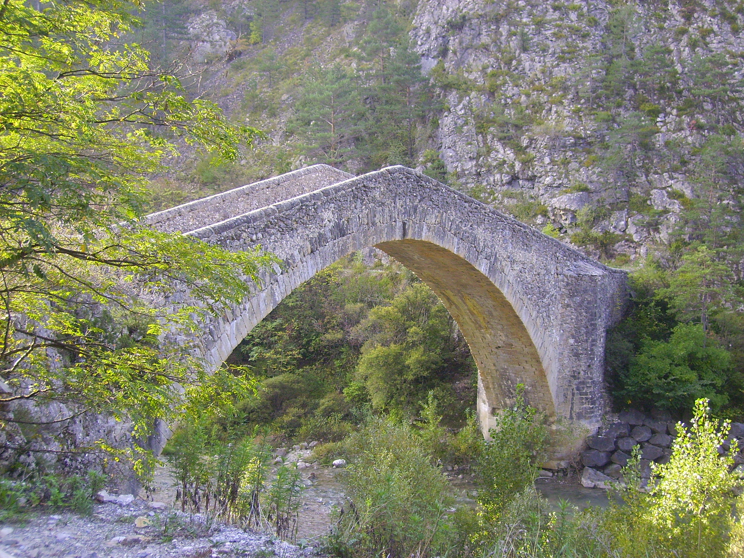 Le pont de la reine Jeanne entre Entrevaux et Annot